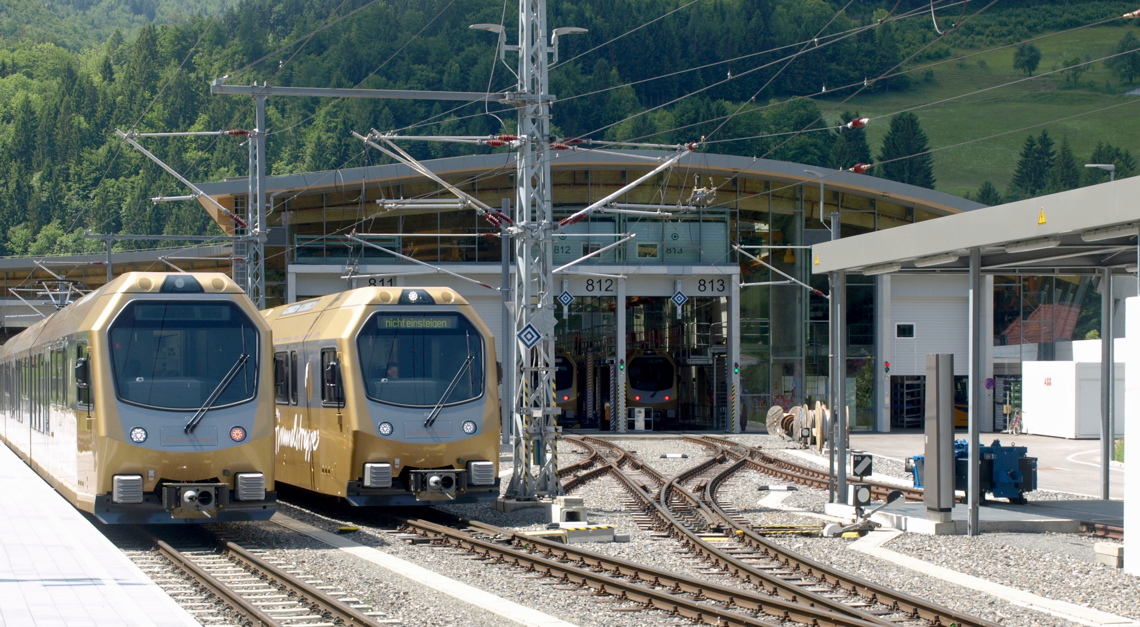 NÖVOG Betriebszentrum Laubenbachmühle